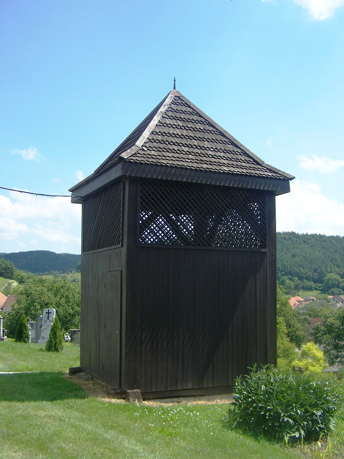 R. k. templom (Szentlélek) (Bükkszék, Templom utca) This is a photo of a monument in Hungary. Identifier: 5445